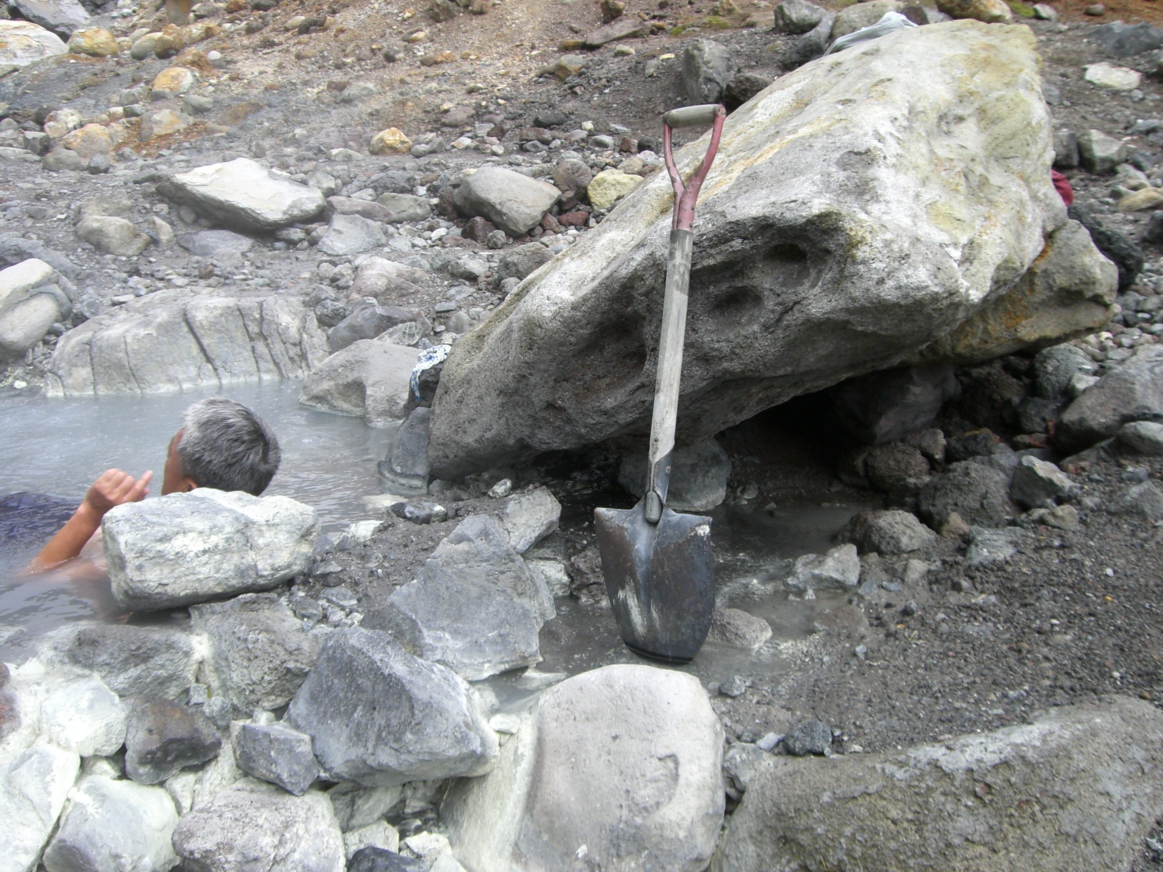 hotsprings_and_maintenance-tool_Nakadake_hotspring_daisetuza 中岳温泉湯船とメンテナンス用シャベル